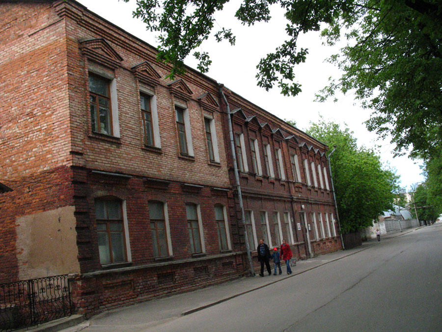 Old house at Pakroŭskaja street in Viciebsk